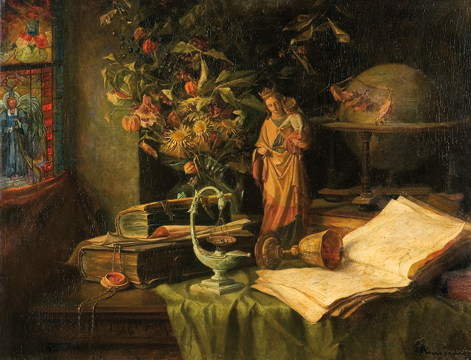 Stillleben